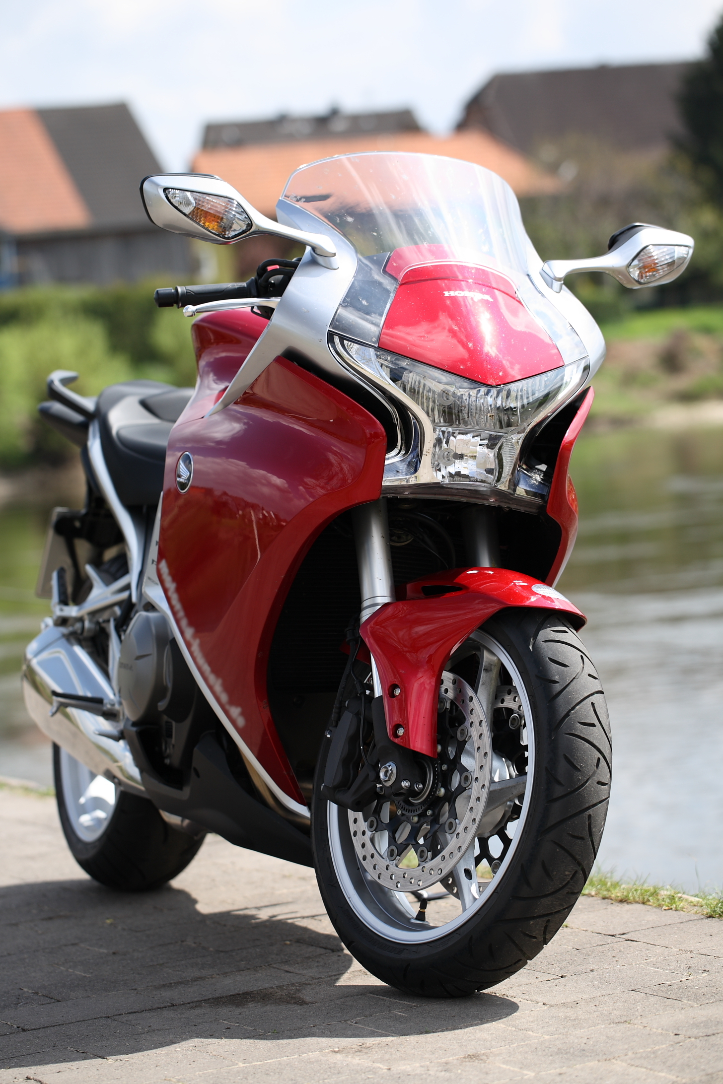 Honda VFR 1200 F, Bj.2010, Farbvariante: Candy Prominence Red